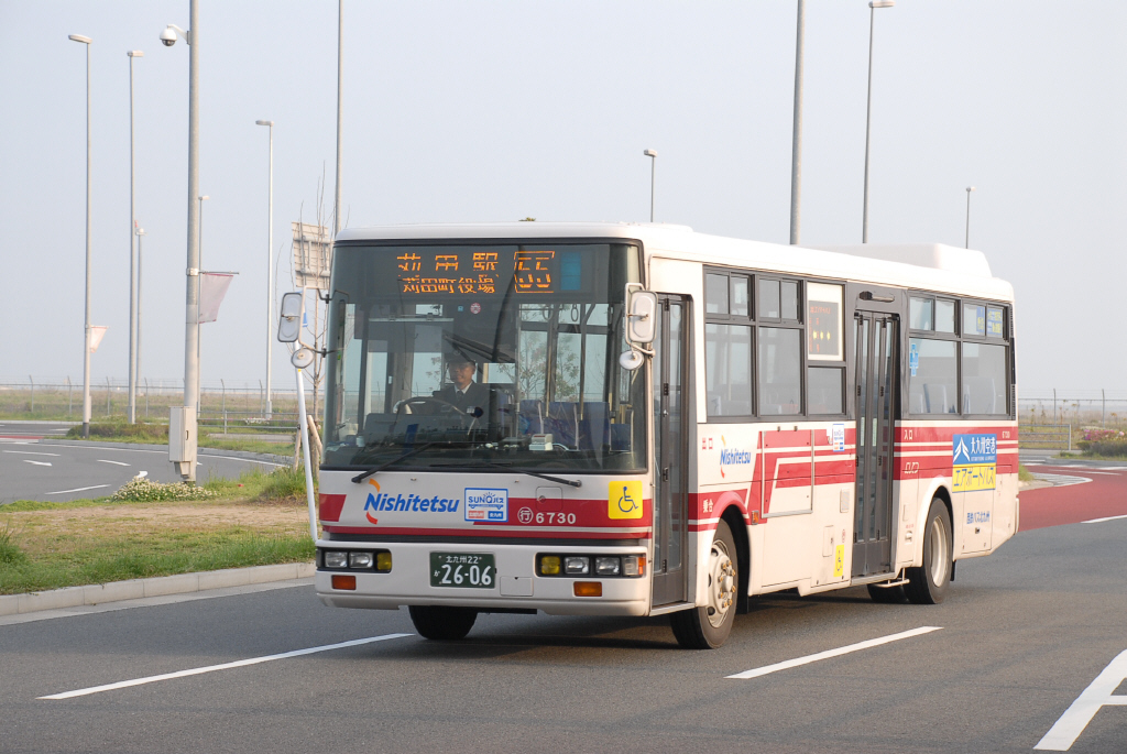 55番 苅田駅行き